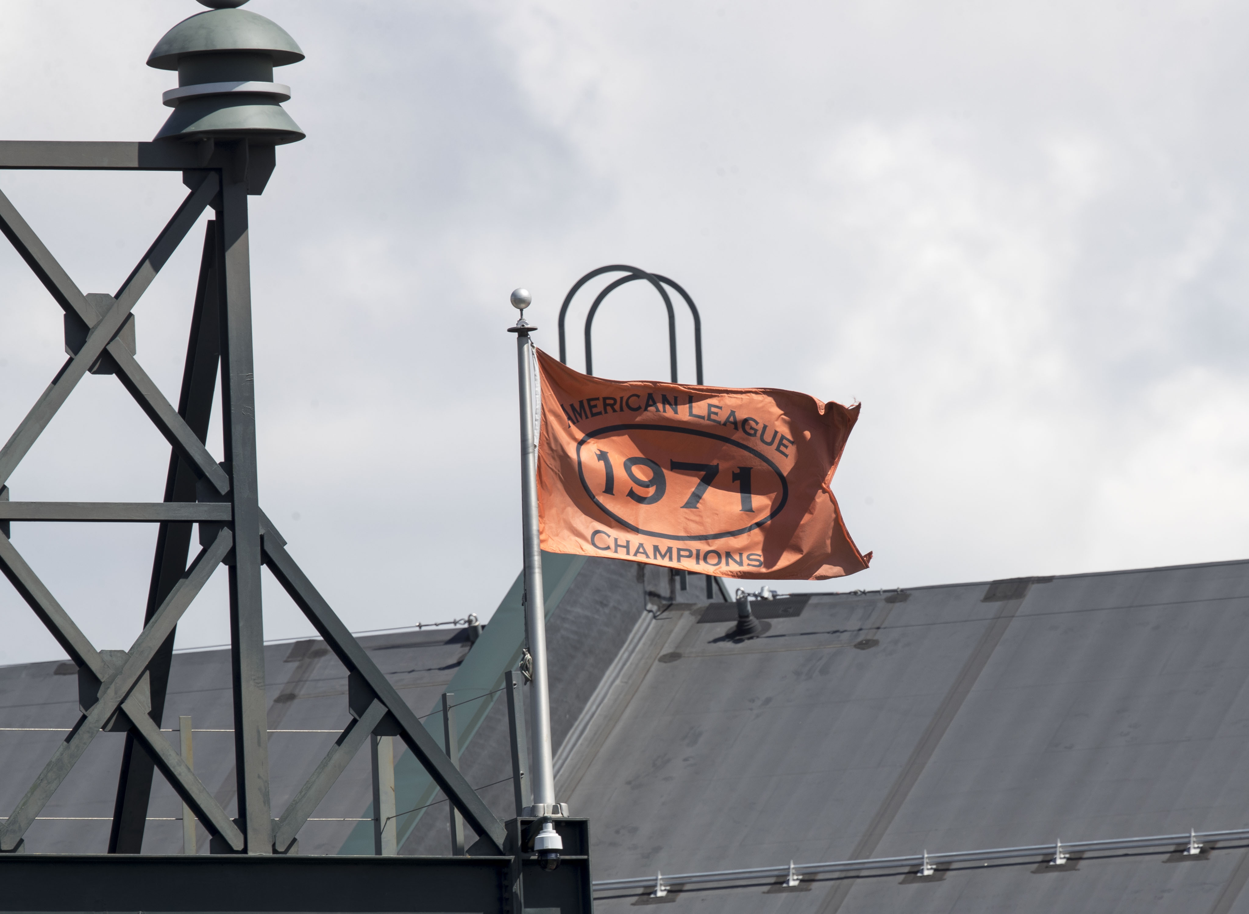 Yankees at Orioles 9/7/17